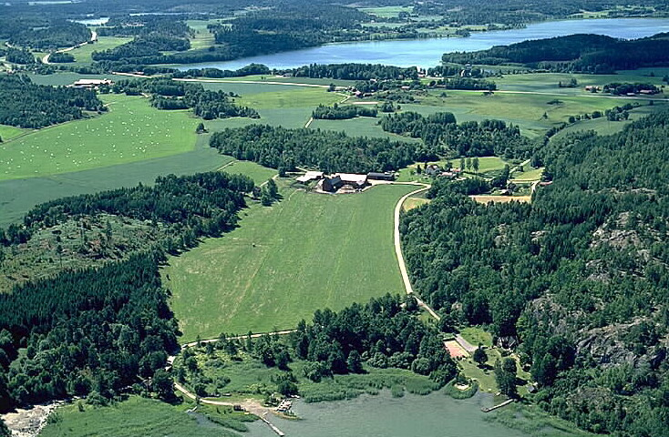 Åby kvarn (i bildmitt), Stavbofjärden (längst fram) Hölö kyrksjö (i bakgrunden).